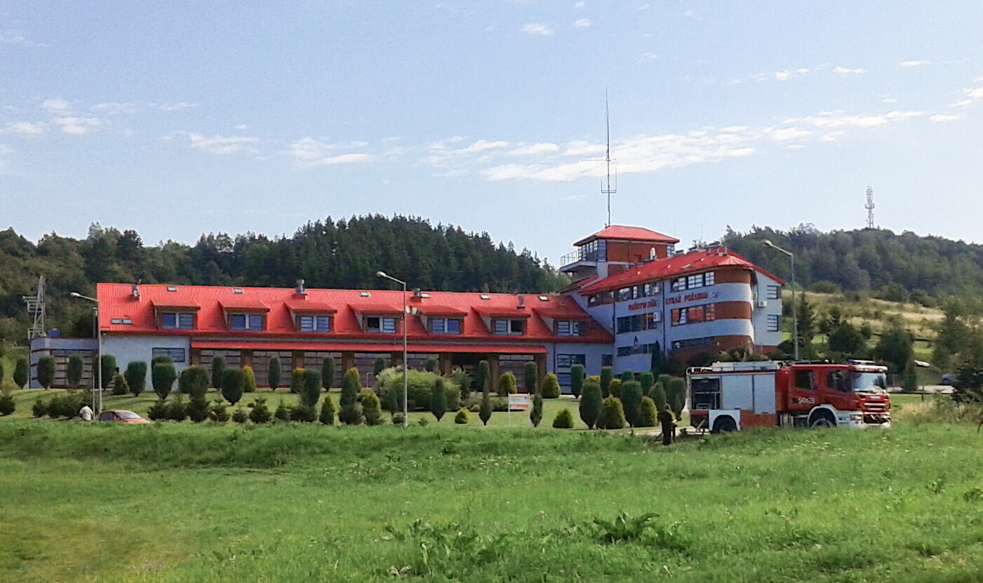 Komenda Powiatowa Państwowej Straży Pożarnej w Sanoku